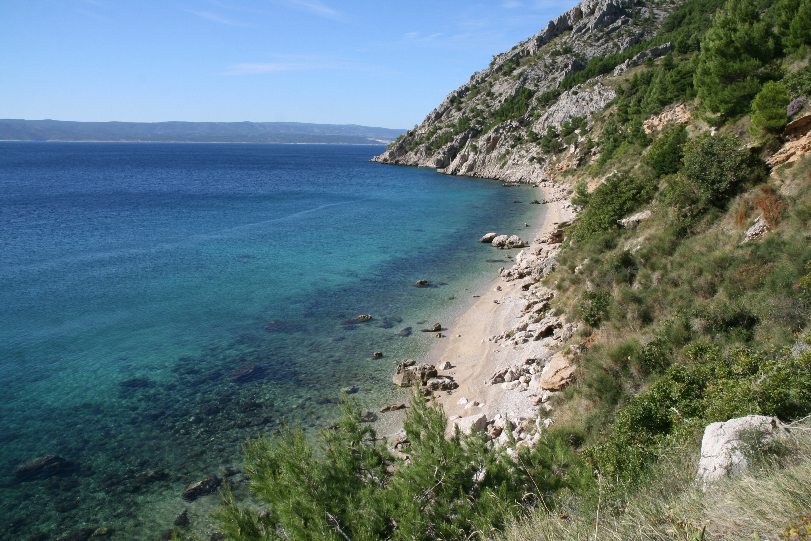 by Niederkasseler